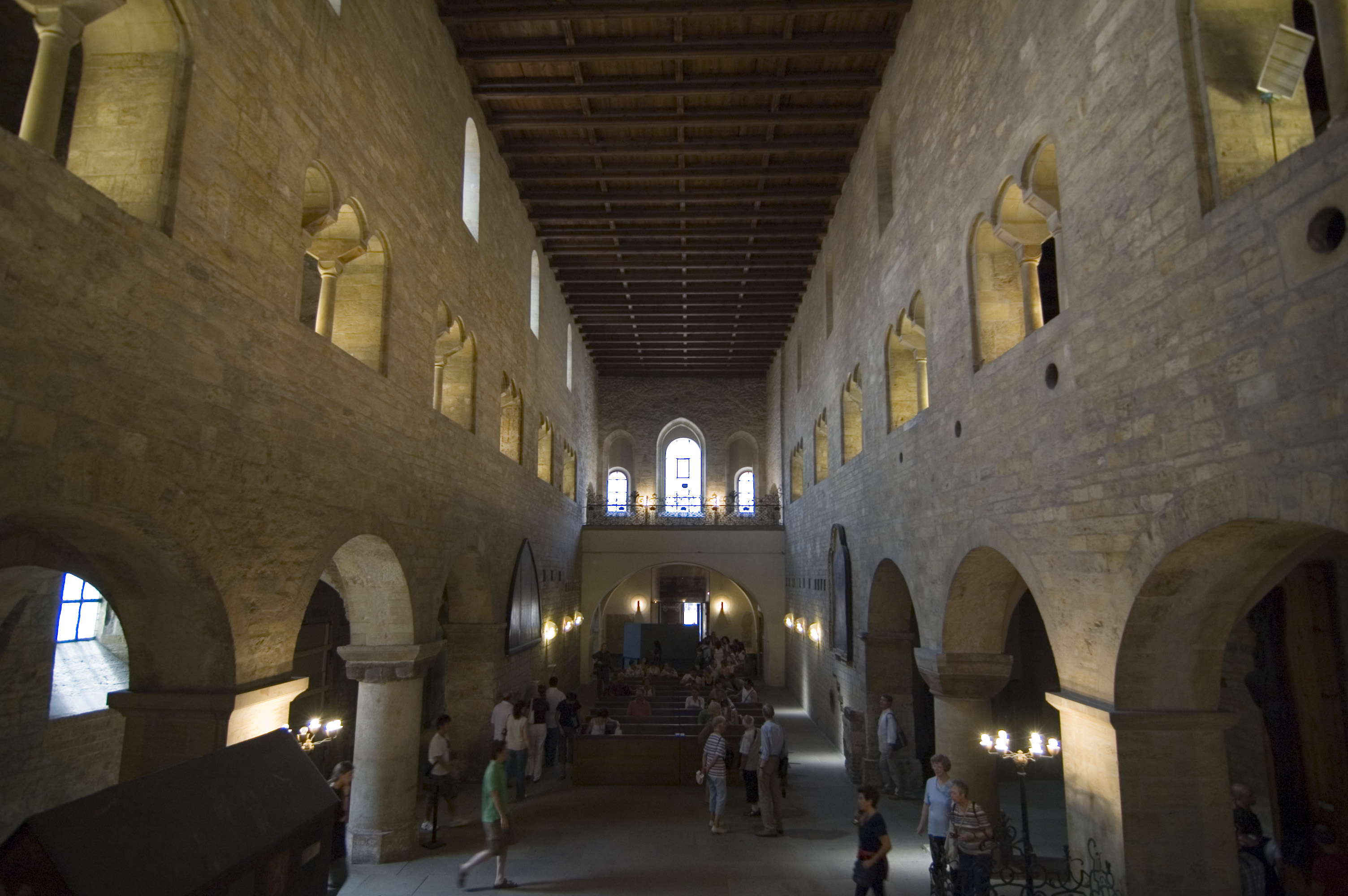 Pražský hrad, Bazilika svatého Jiří